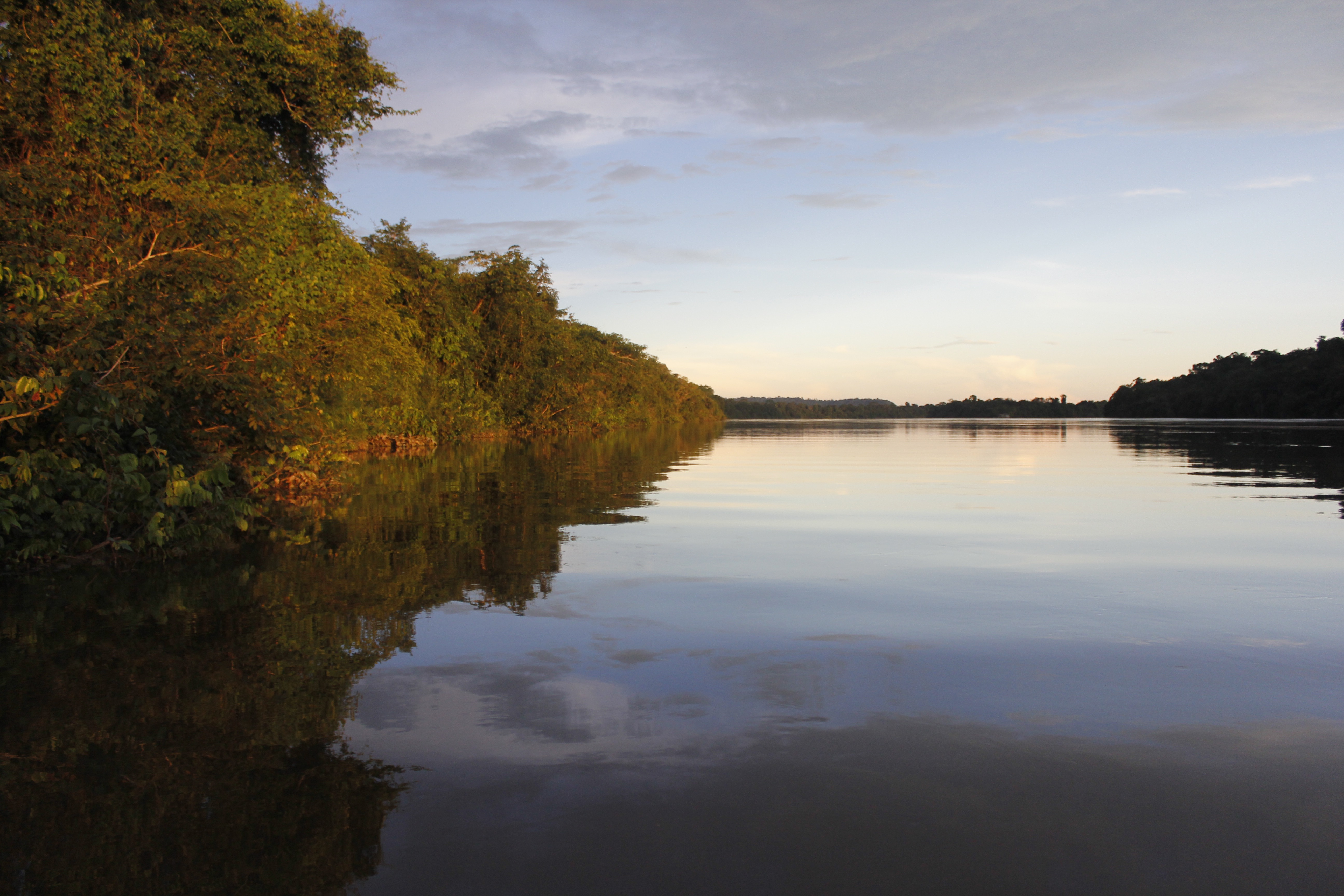 Luz de um por do sol na extremidade sul do parque